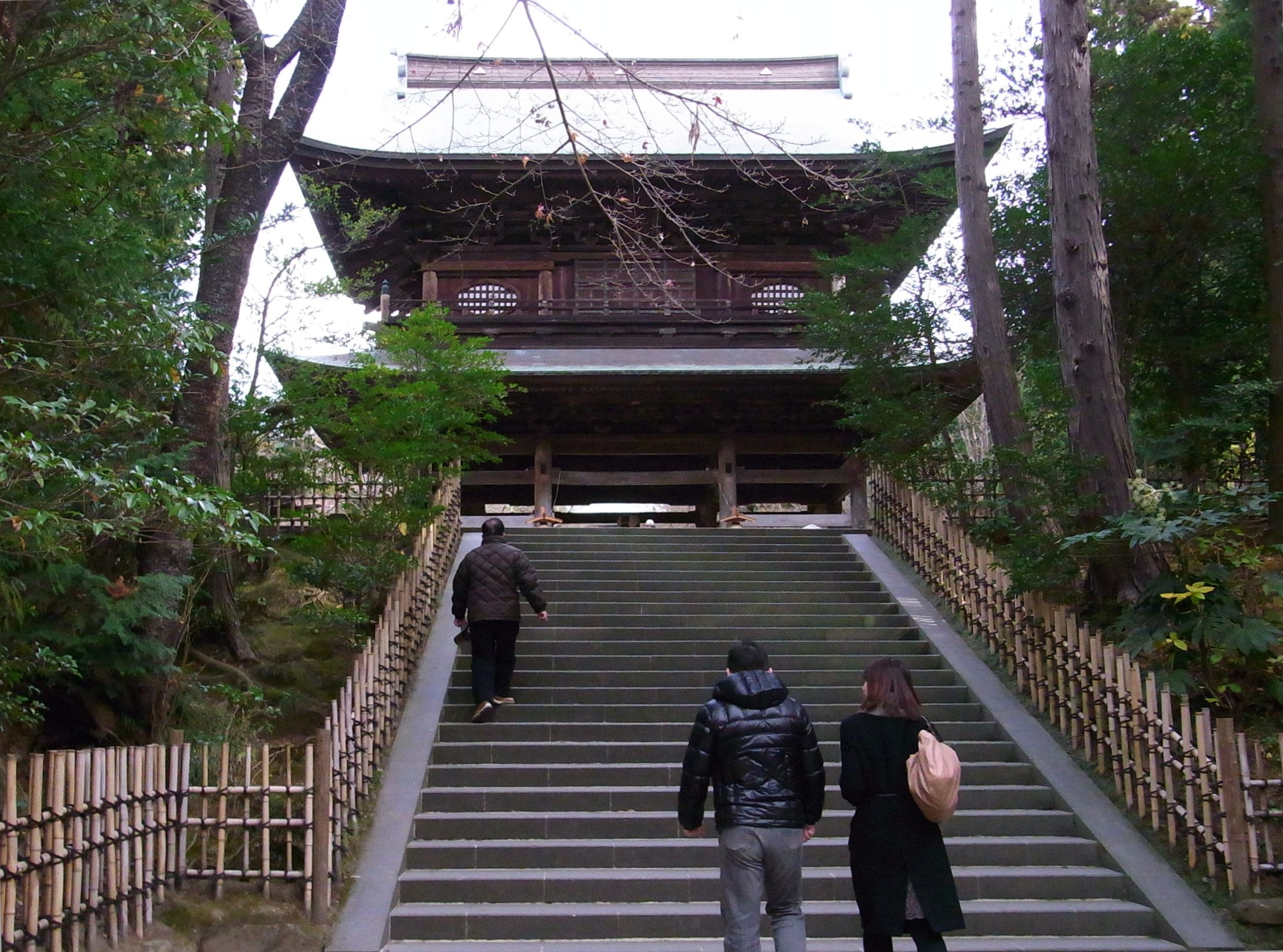 （2011年1月3日撮影）